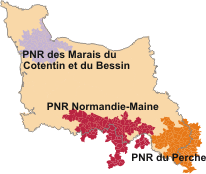 Parcs Naturels Régionaux de la Manche et du Calvados